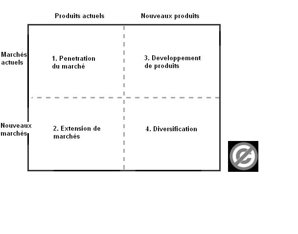 schema de la matrice d'Ansoff. je suis l'auteur de ce schema, les droits sont donc dans le domaine public. Licensing La stratégie utilisée quand il s'agit d'un nouveau produit et un marché actuel est: "Développement du produit". Et la stratégie utilisée quand il s'agit d'un nouveau marché et un produit actuel est: "Extension du marché". C'est inversé dans l'illustration!!